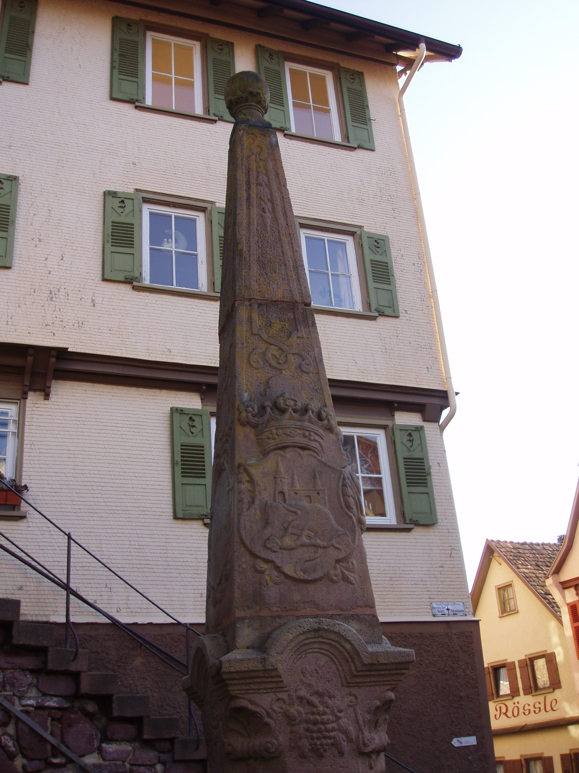 Brunnen in Altensteig, Detail